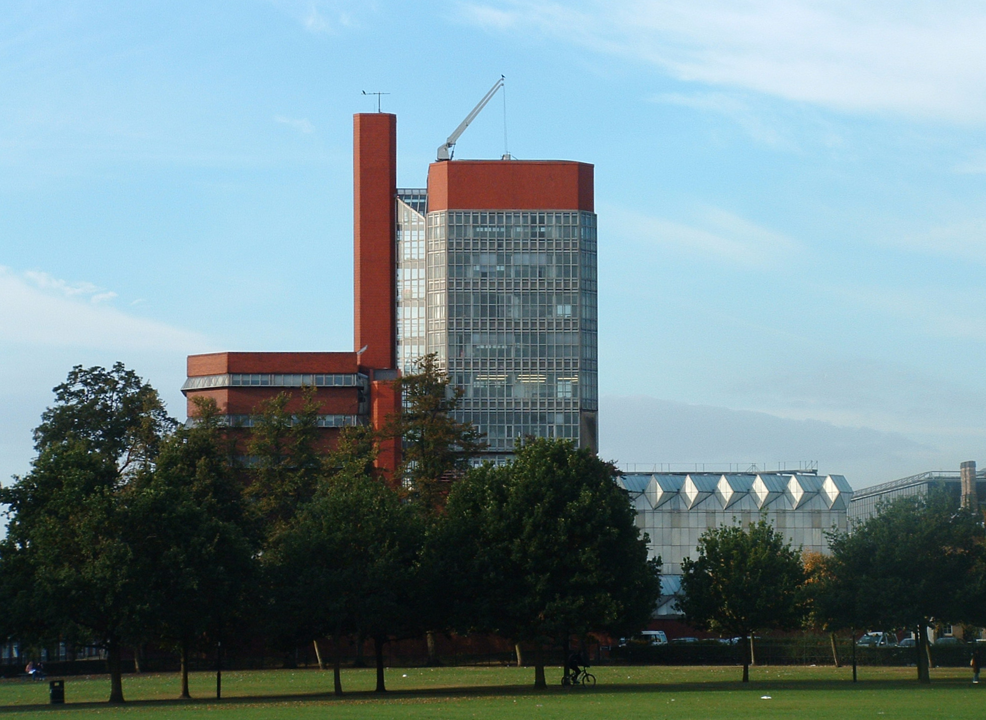 Vista exterior de la Escuela de Ingeniería de la Universidad de Leicester (Inglaterra). Edificio diseñado por James Stirling.